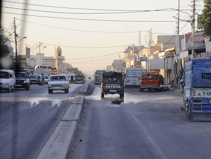 פעולת "כראמה", מבצע "תופת". רחובות כראמה.